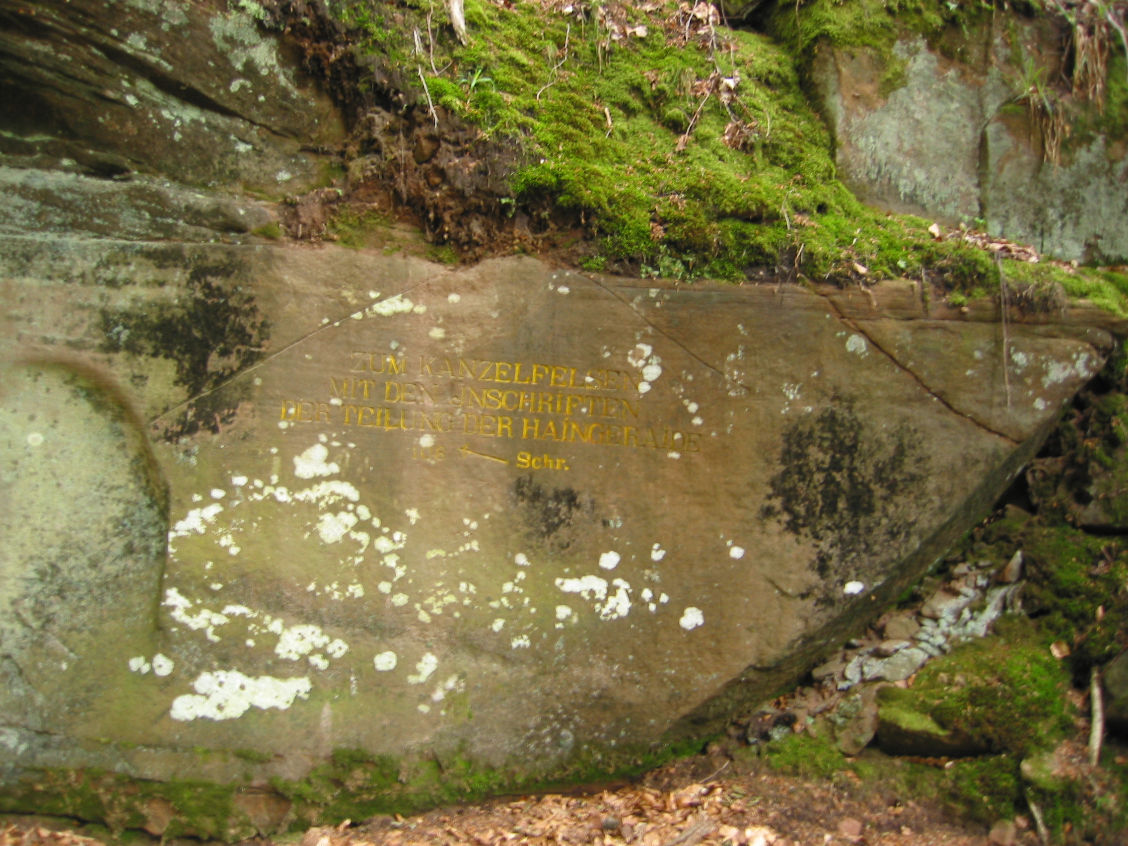 Riiterstein Nummer 90, Zum Kanzelfelsen mit den Inschriften der Teilung der Haingeraide 108 Schr.